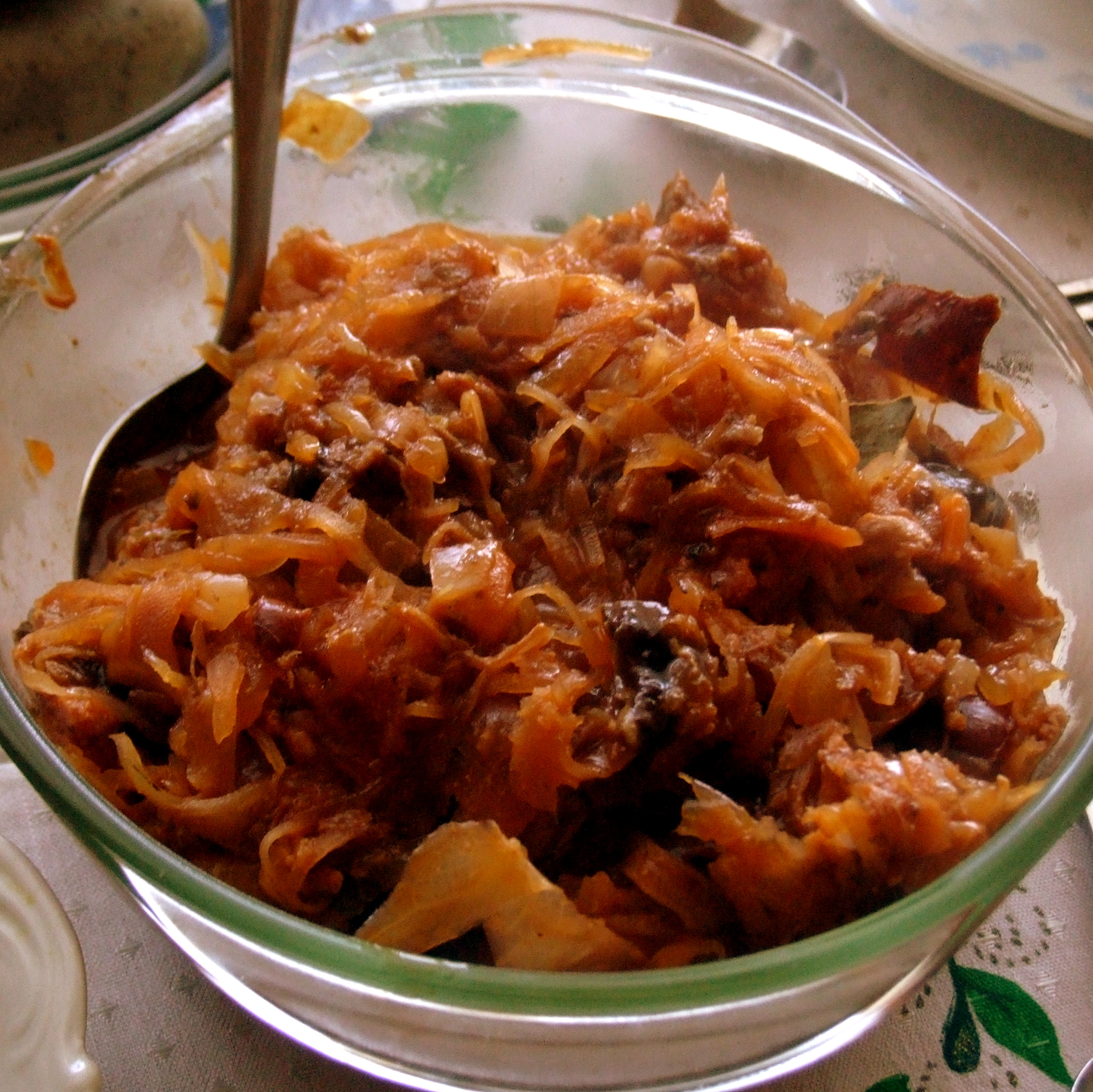 Żywność, bigos